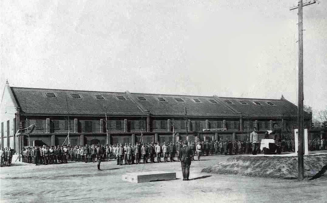 陸軍被服支廠前で行われる在郷軍人会表彰式。昭和19年2月。